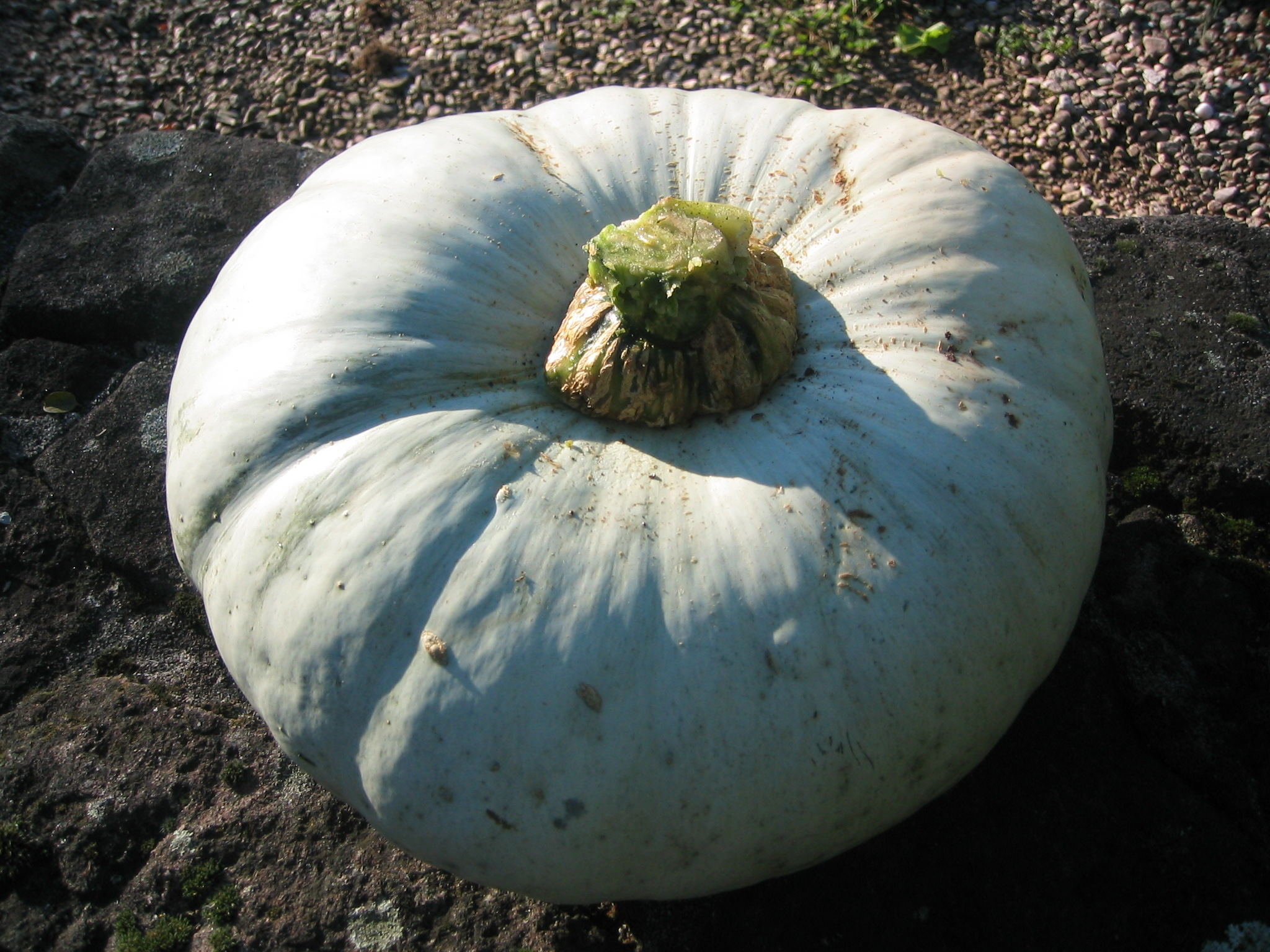 Potiron bleu de Hongrie, spécimen récolté dans les Vosges en octobre 2005 Auteur : Jacqueline Louviot Source : Photo personnelle, libre de droits.